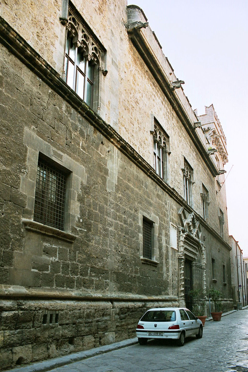 Palazzo Abatellis, Palermo Main facade at Via Alloro